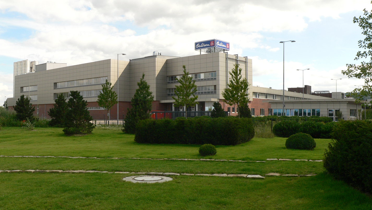 Bahlsenfabrik Barsinghausen